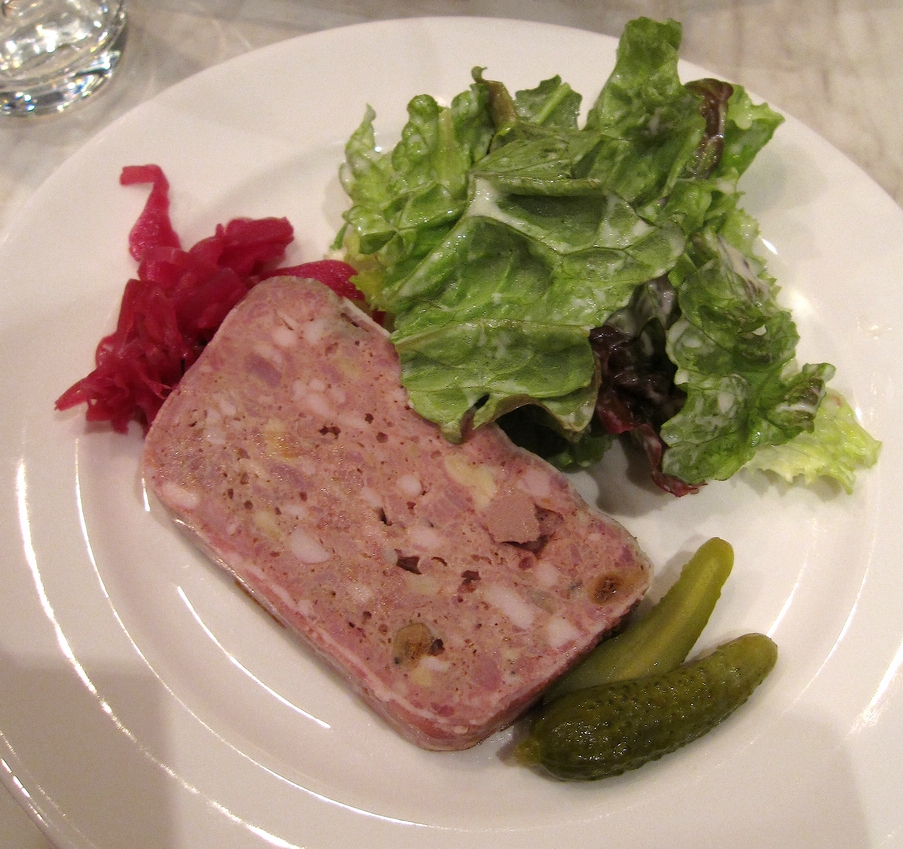 Pâté de campagne mit Salatgarnitur.